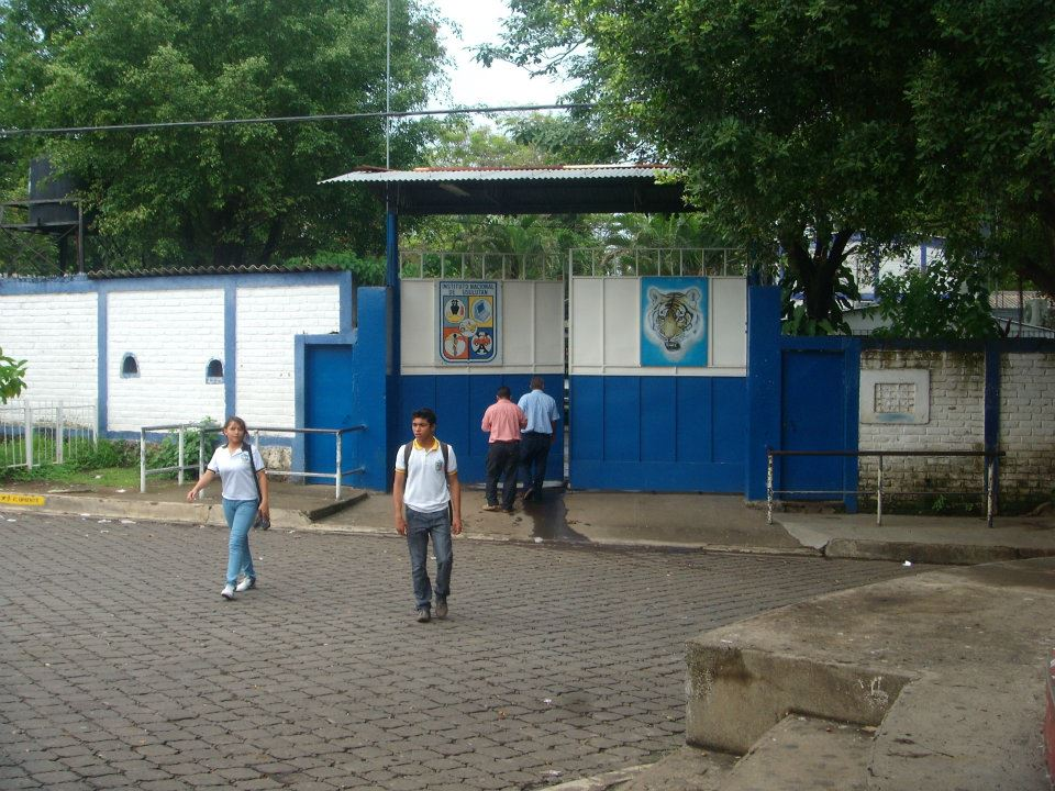 Fachada exterior del Instituto Nacional de Usulután